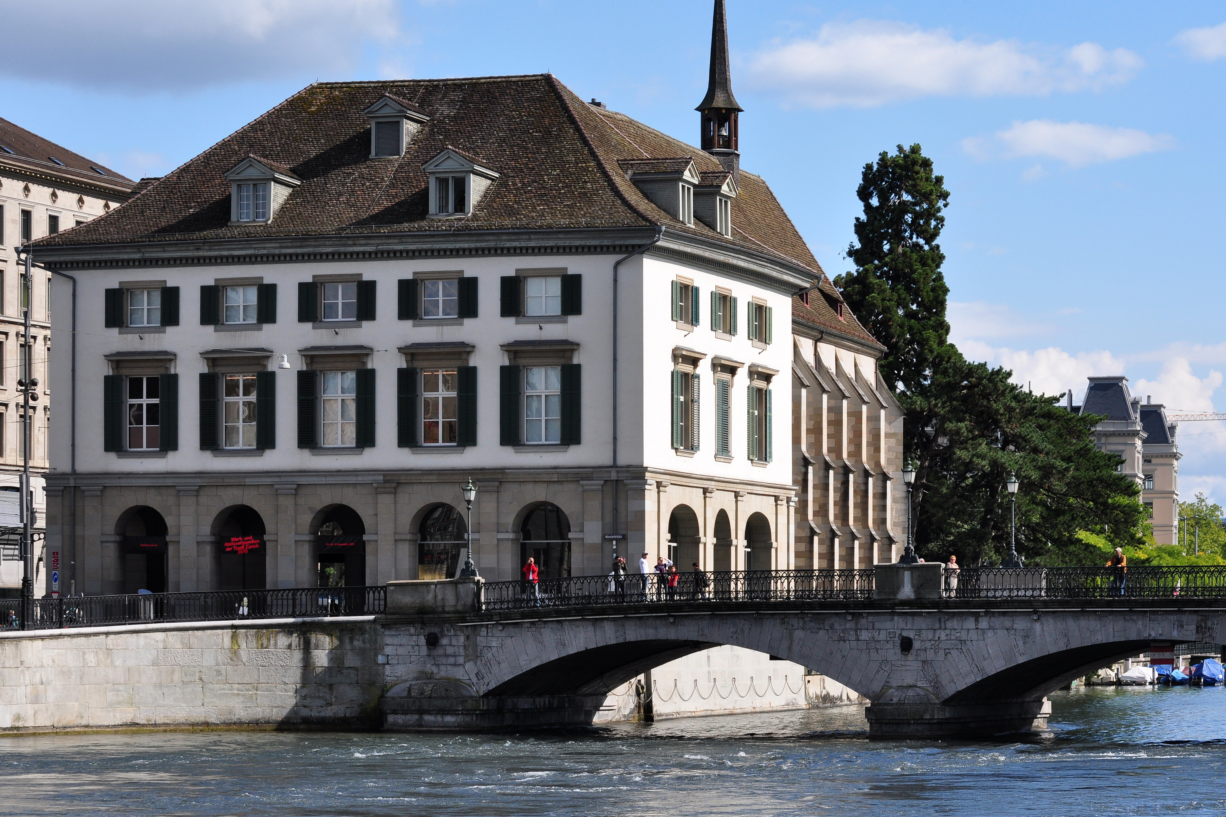 Helmhaus and Wasserkirche in Zürich (Switzerland), as seen from Wühre nearby Münsterhof, Münsterbrücke to the right.